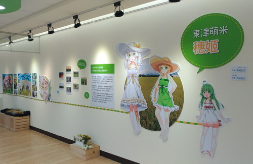 中文（台灣）: 2017年屏東動漫節地方角色特展出展的東津萌米穗姬。